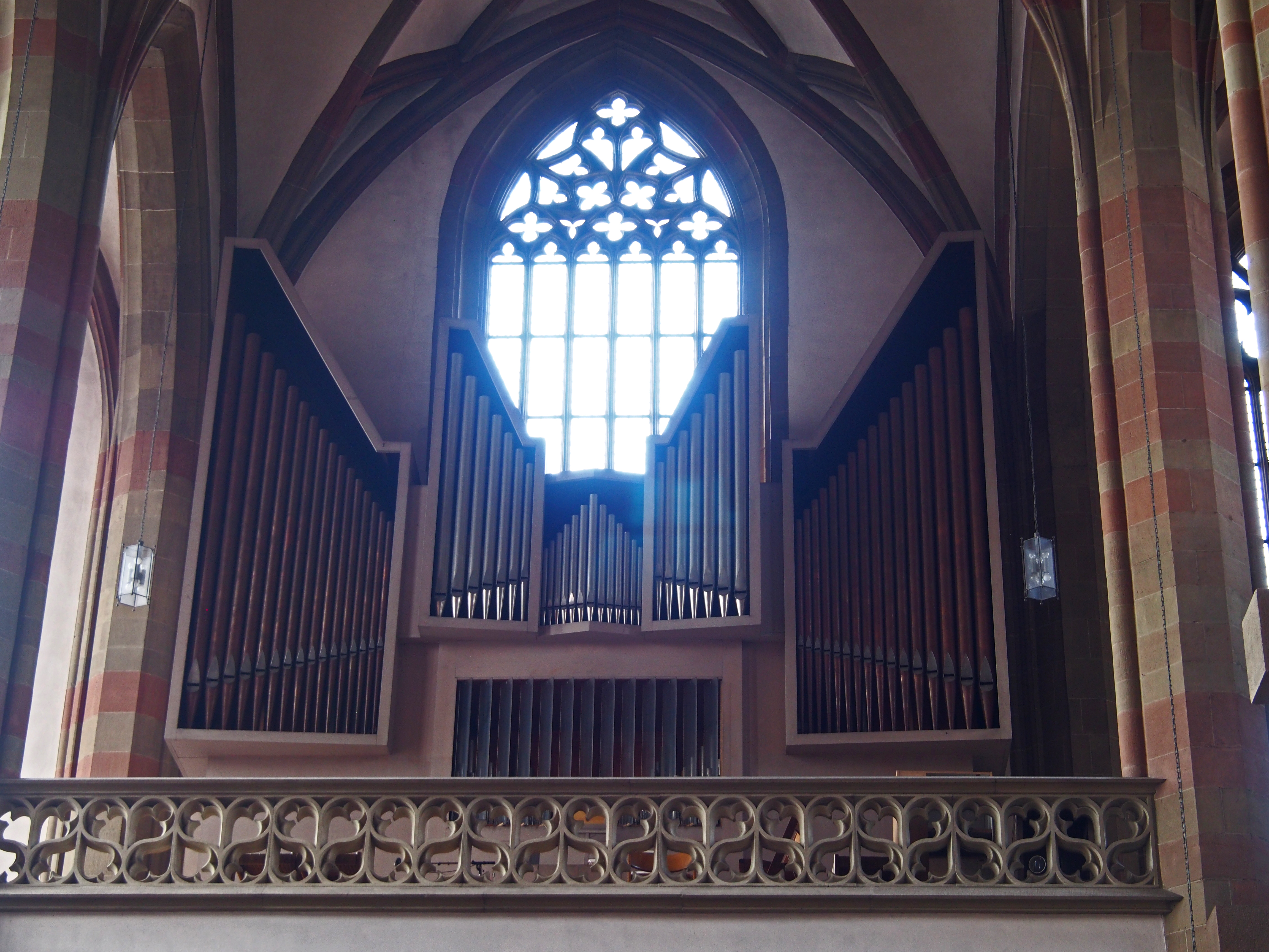 Orgel in der Würzburger Marienkapelle.